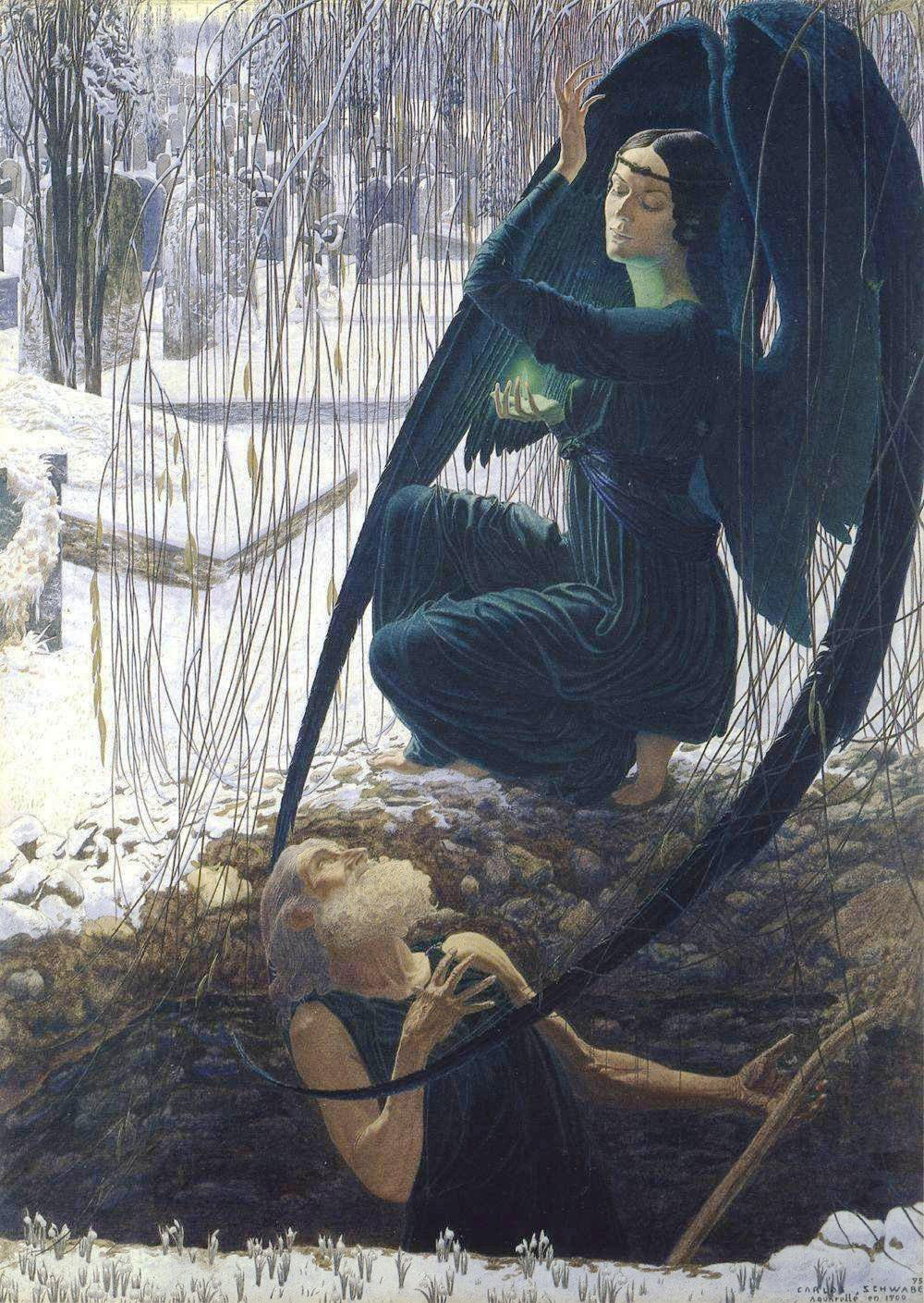 detail